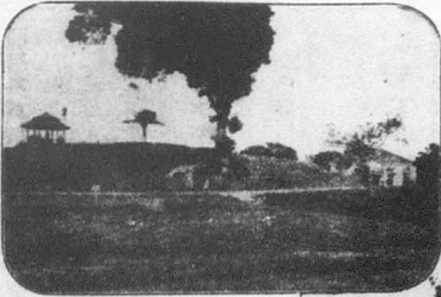 臺南廳農會附屬農園於1911年設立於台南市柱仔行街附近。